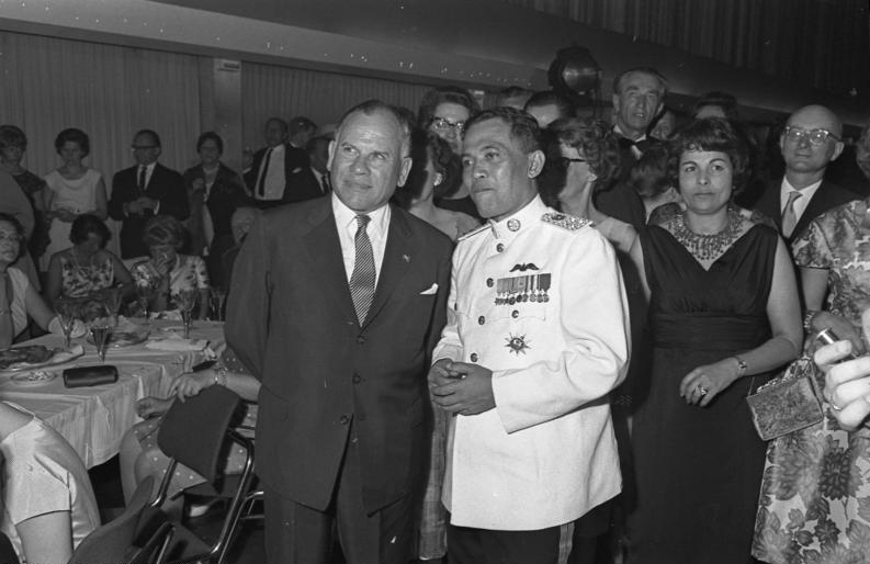 Indonesischer Abend in der Stadthalle Godesberg, Empfang für Nazaruddin Nasution, indonesischer Verteidigungsminister